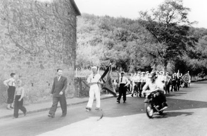 Kirmesumzug 50er Jahre